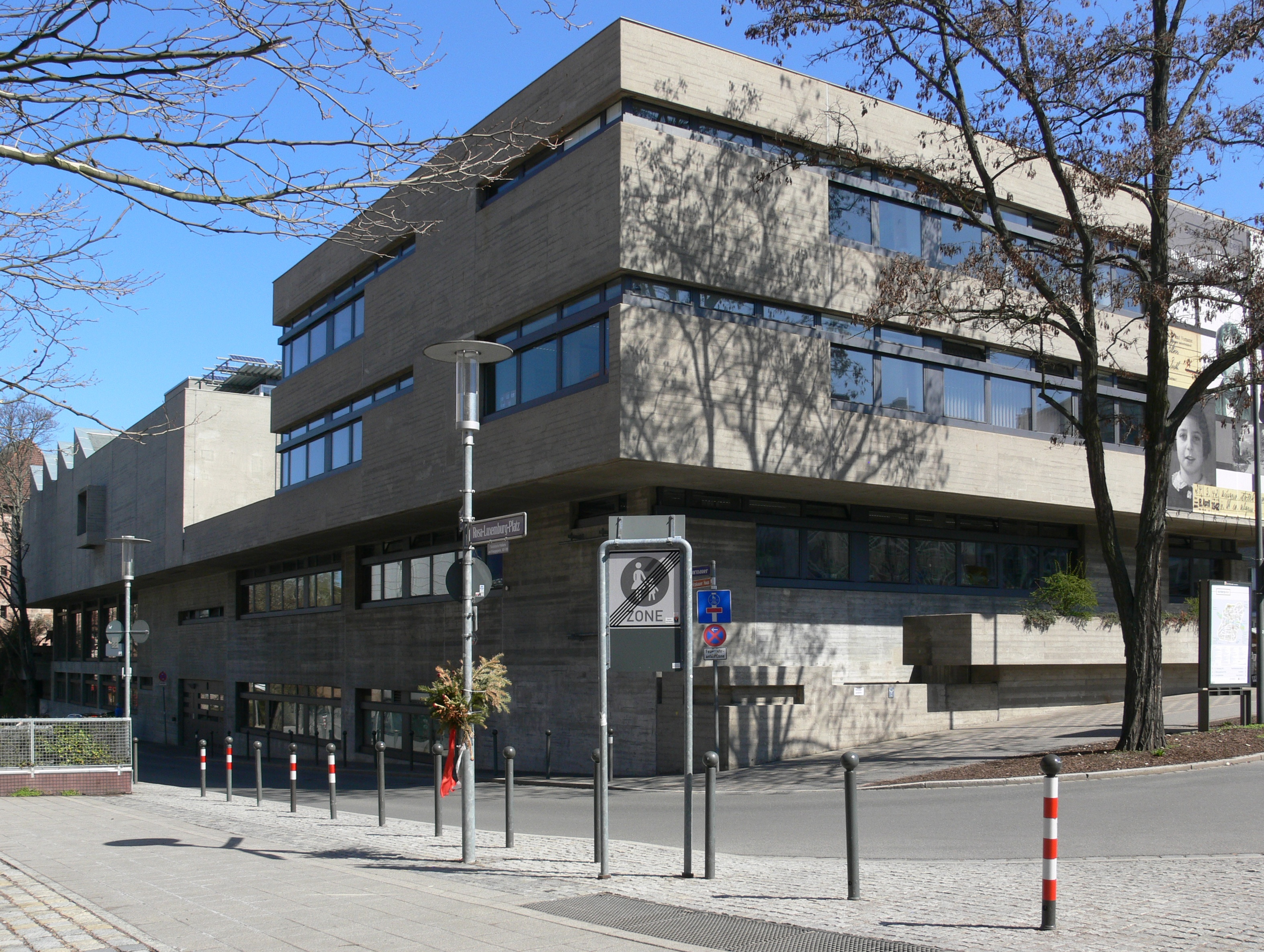 Nürnberg, Norishalle (Naturhistorisches Museum und Stadtacrhiv) Ecke Marientormauer (die Straße links) und Gewerbemuseumsplatz